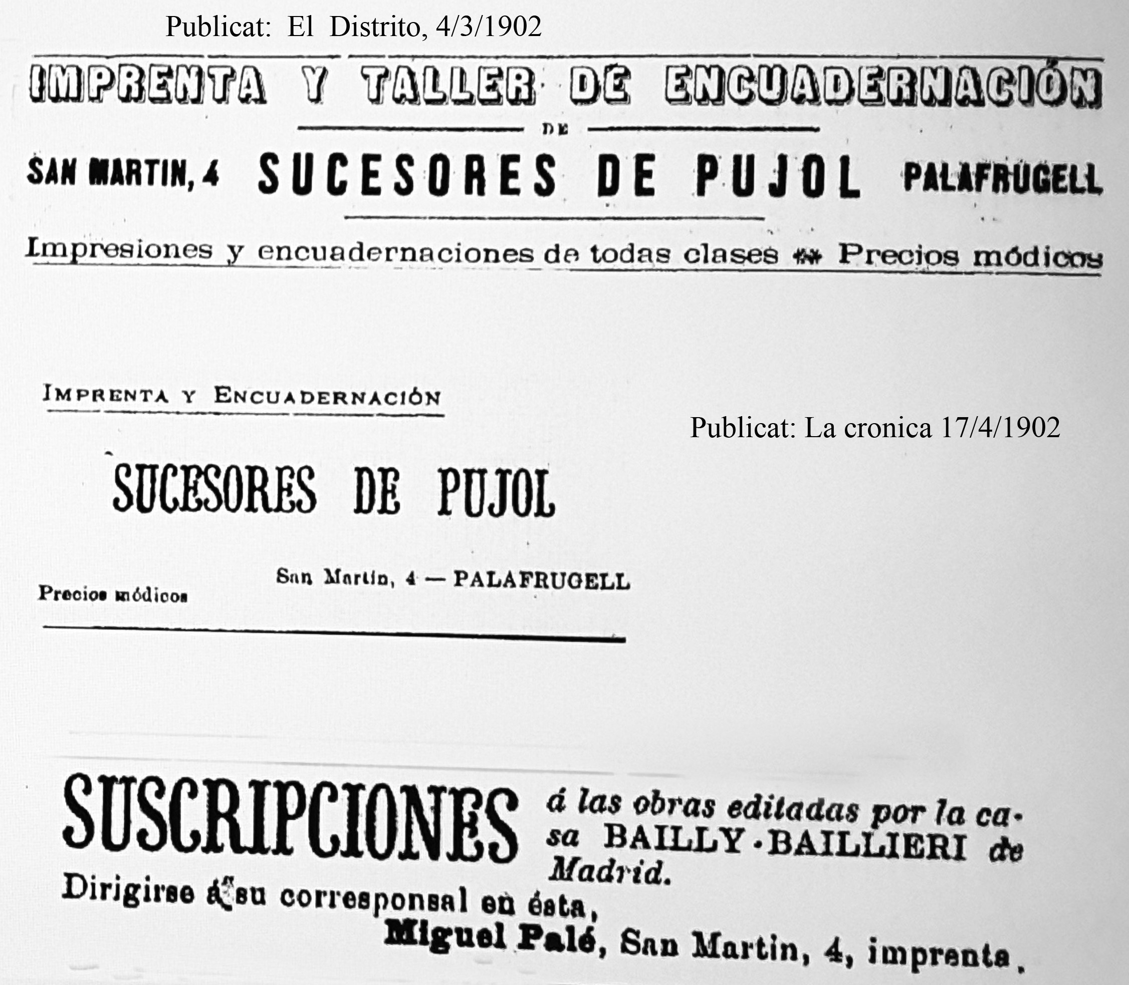 Dolors Cané va rebre de Simon Pujol la emprebta que tenia a la Bisbal d'Empordà